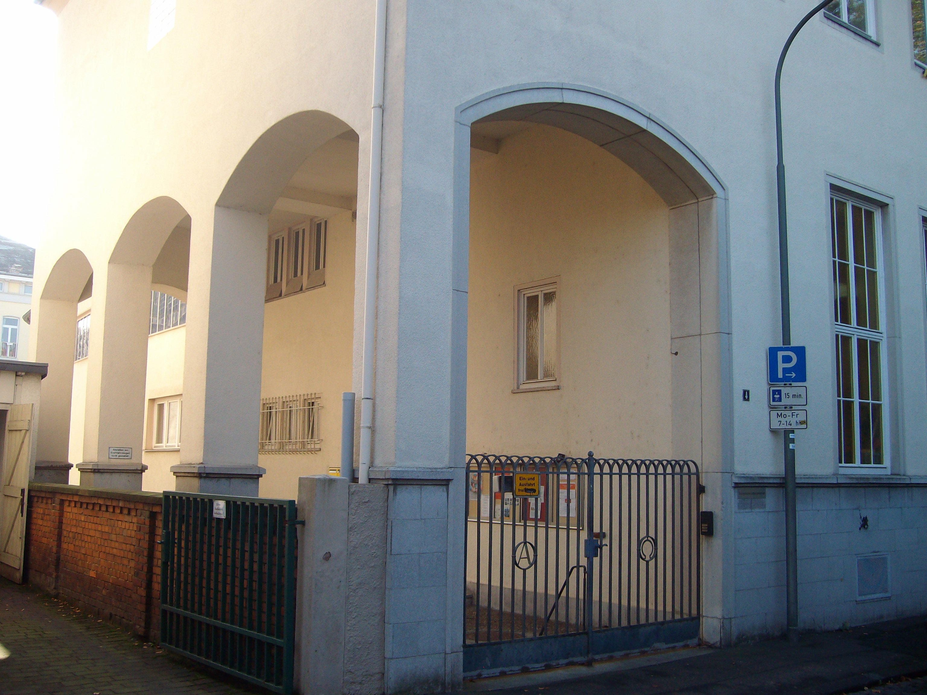 Lukaskirche, Gießen, Hessen, Deutschland